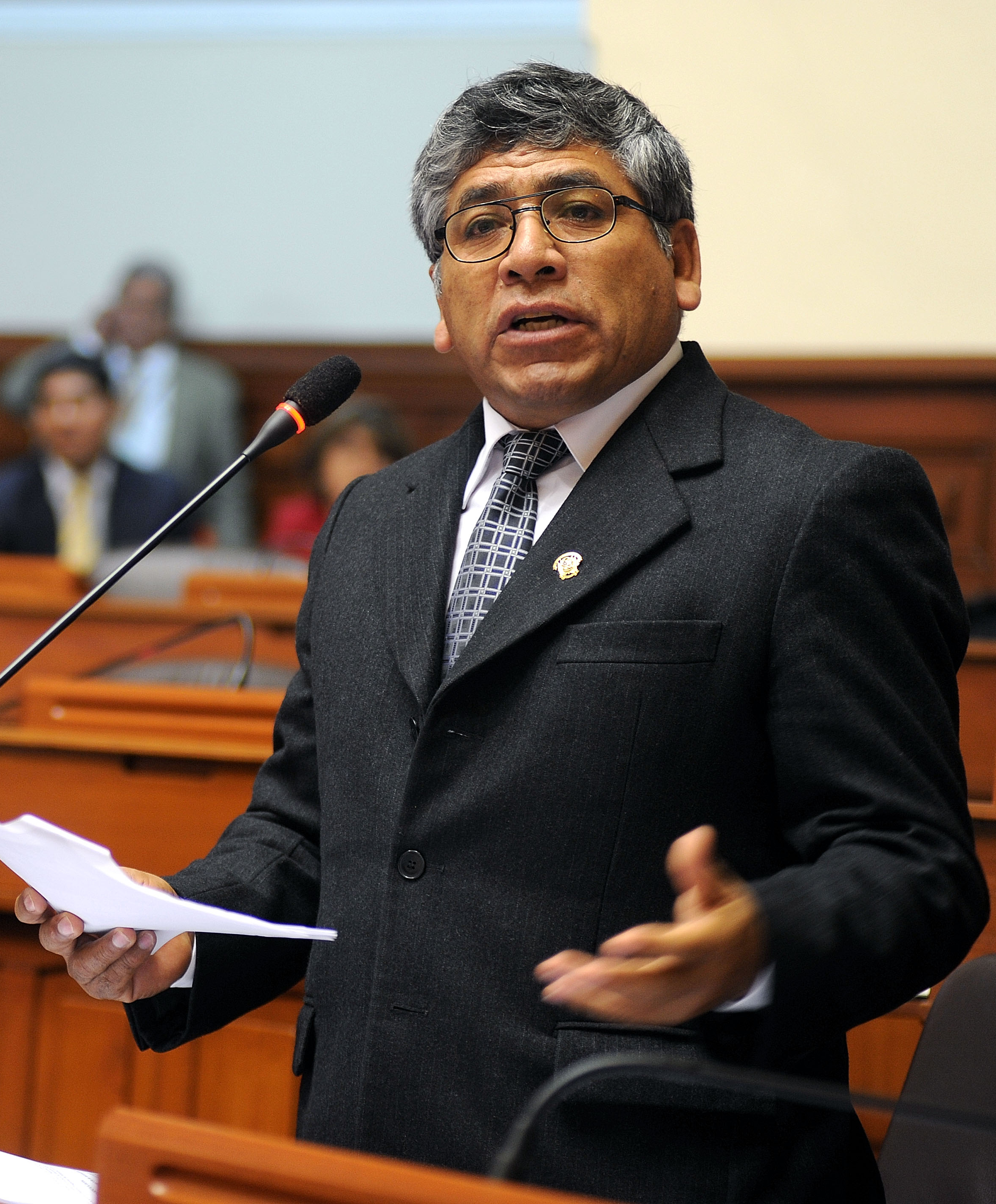 El legislador Pedro Santos Carpio expresa su posición en el debate parlamentario realizado esta tarde por el Pleno congresal